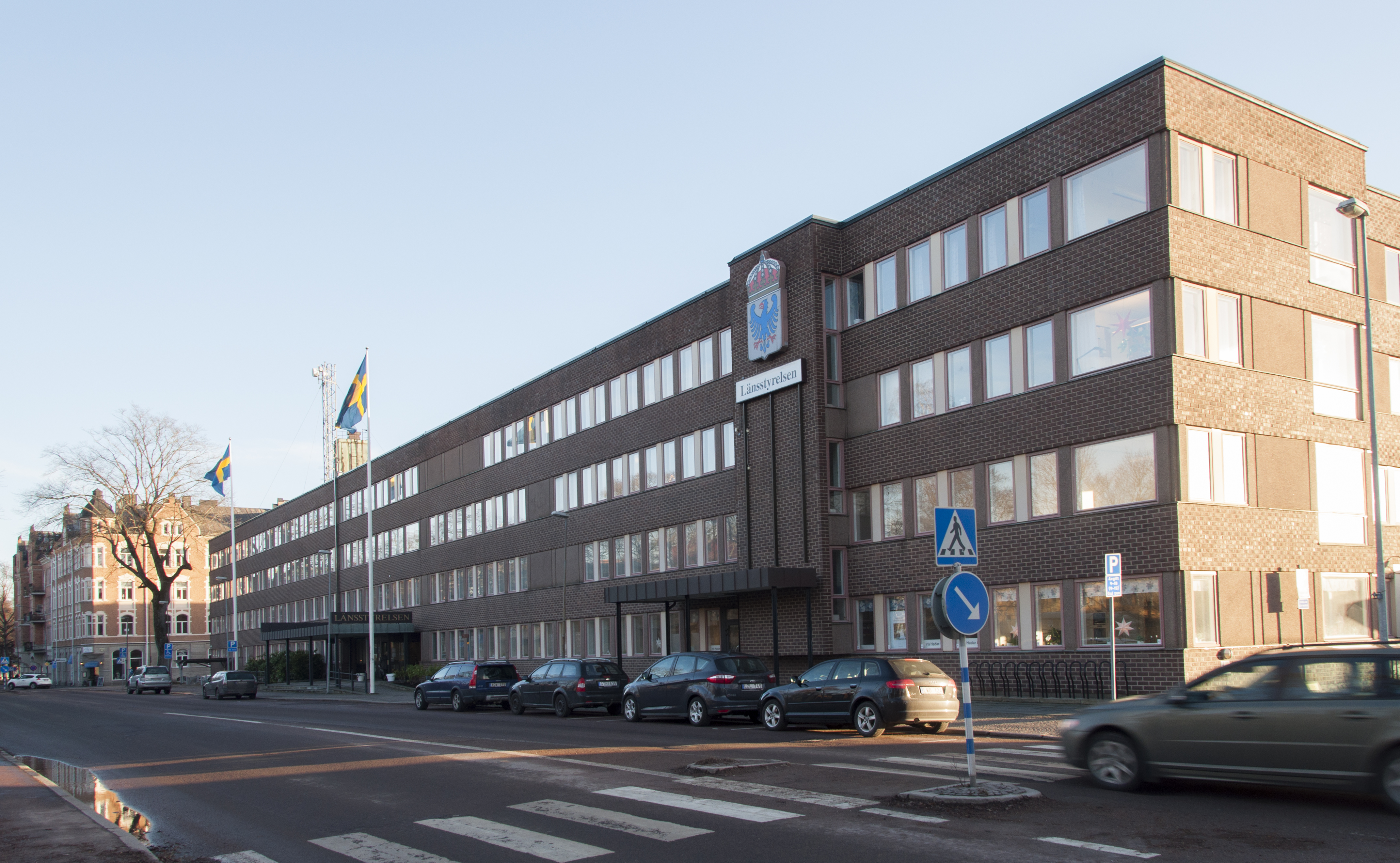 Länsstyrelsen i Karlstad. Byggår 1967 arkitekt: Gösta Edberg